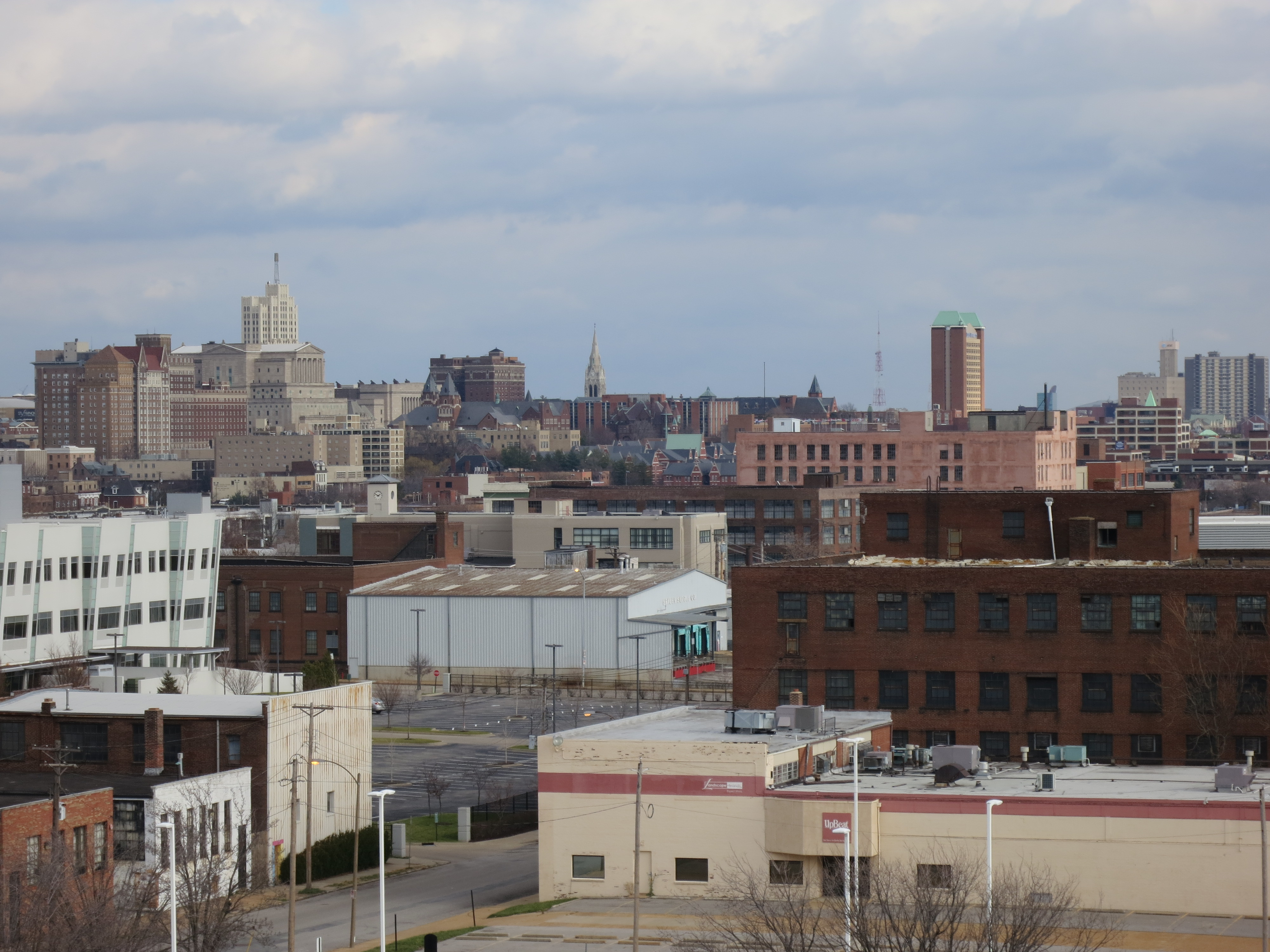 Midtown